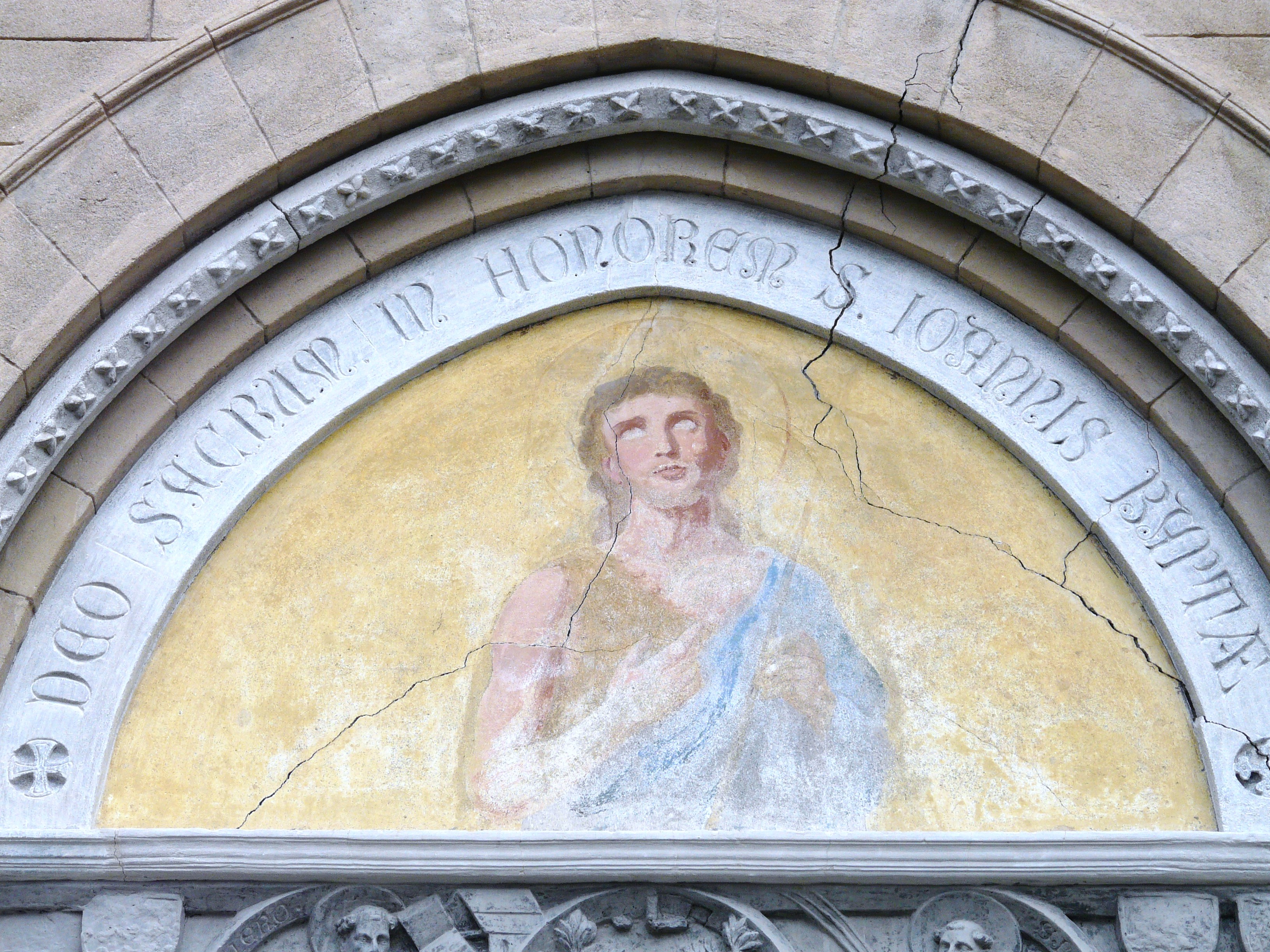 Portale della chiesa di San Giovanni, Quarto dei Mille, Genova, Liguria, Italia